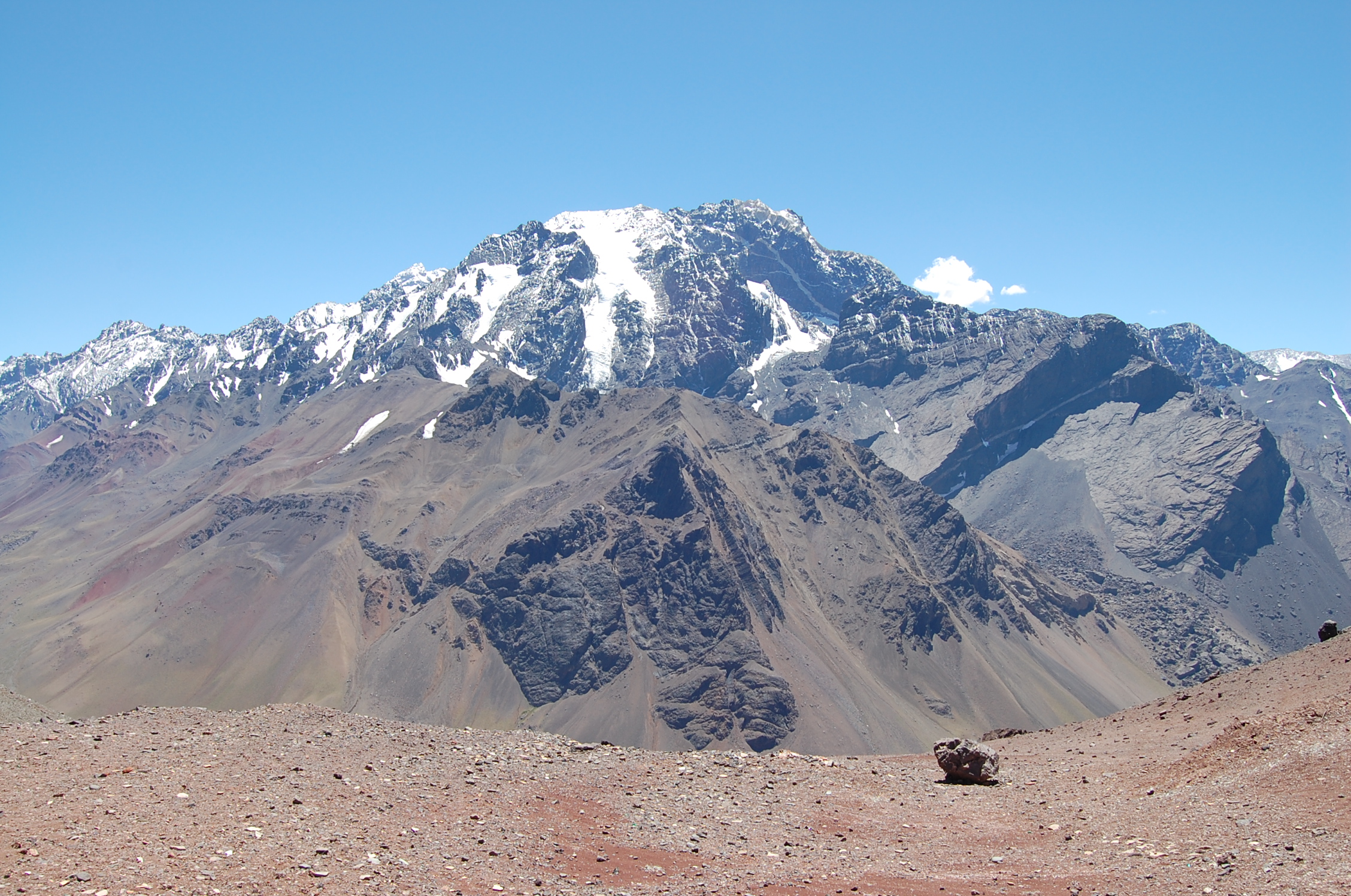 Cordillera de los Andes, Argentina